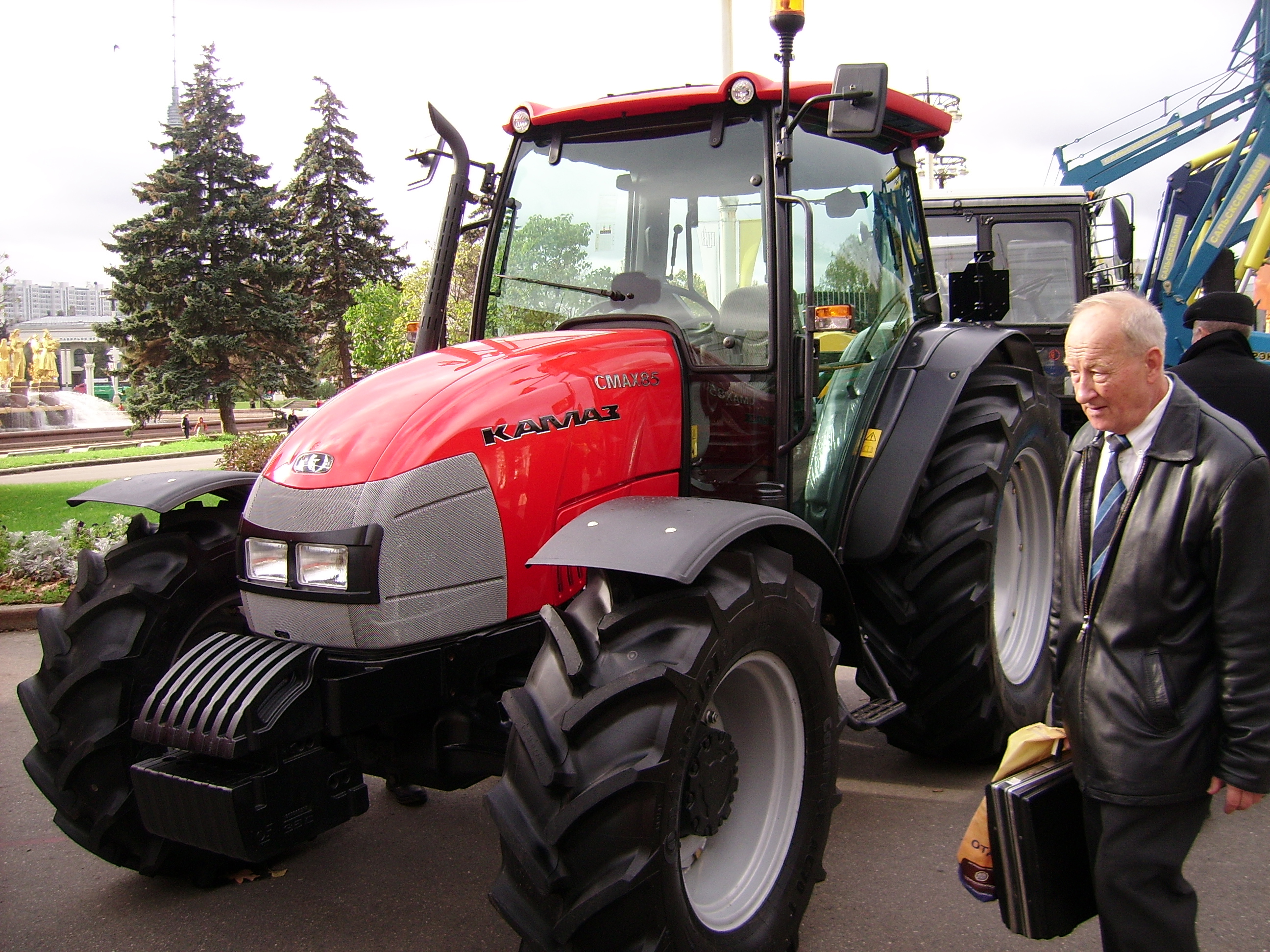 Трактор КАМАЗ CMAX85. «Выставка Золотая осень — 2008» на ВВЦ